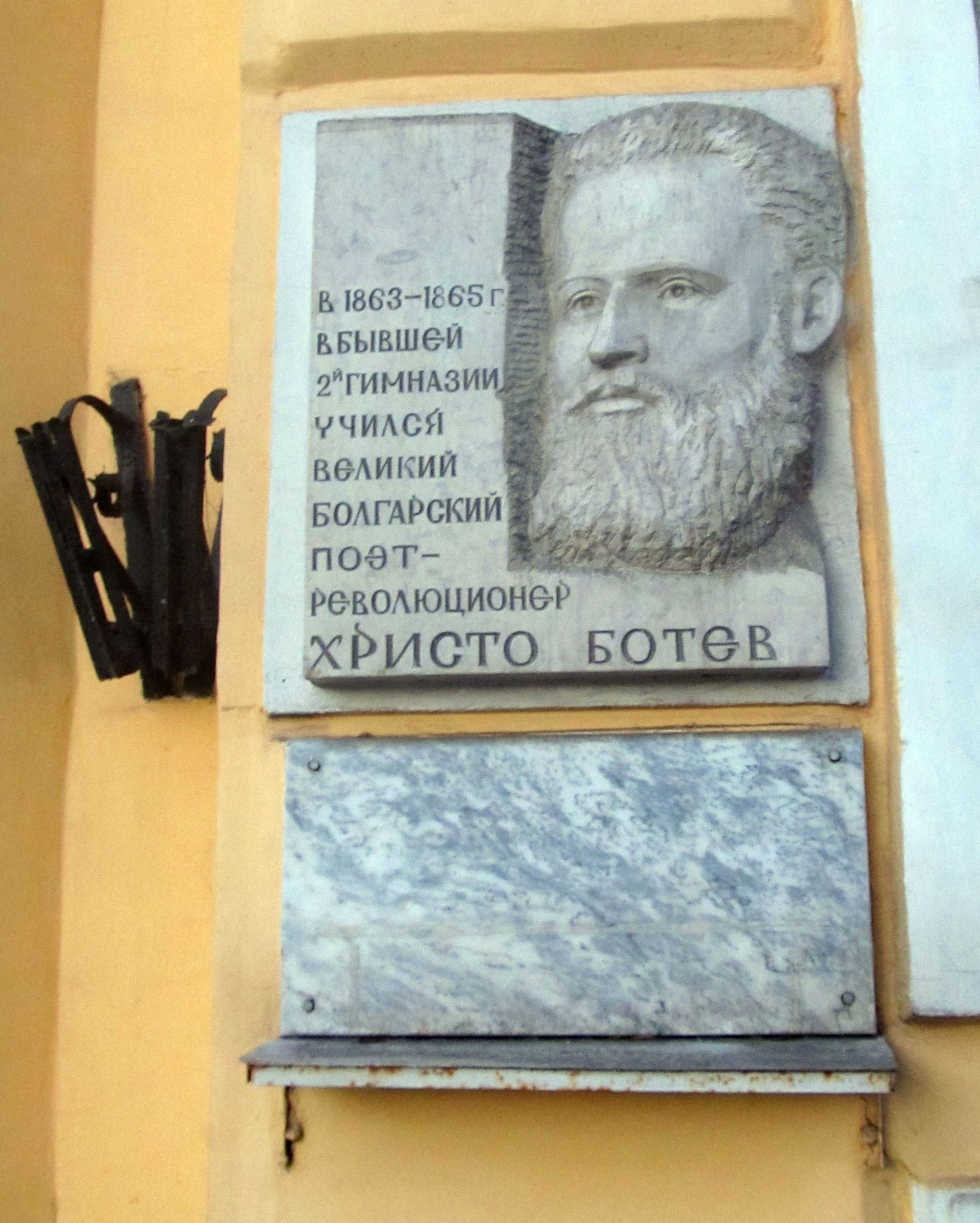 Мемориална плоча на сградата в която била гимназията където се учил Ботев. ул Новоселски, 72